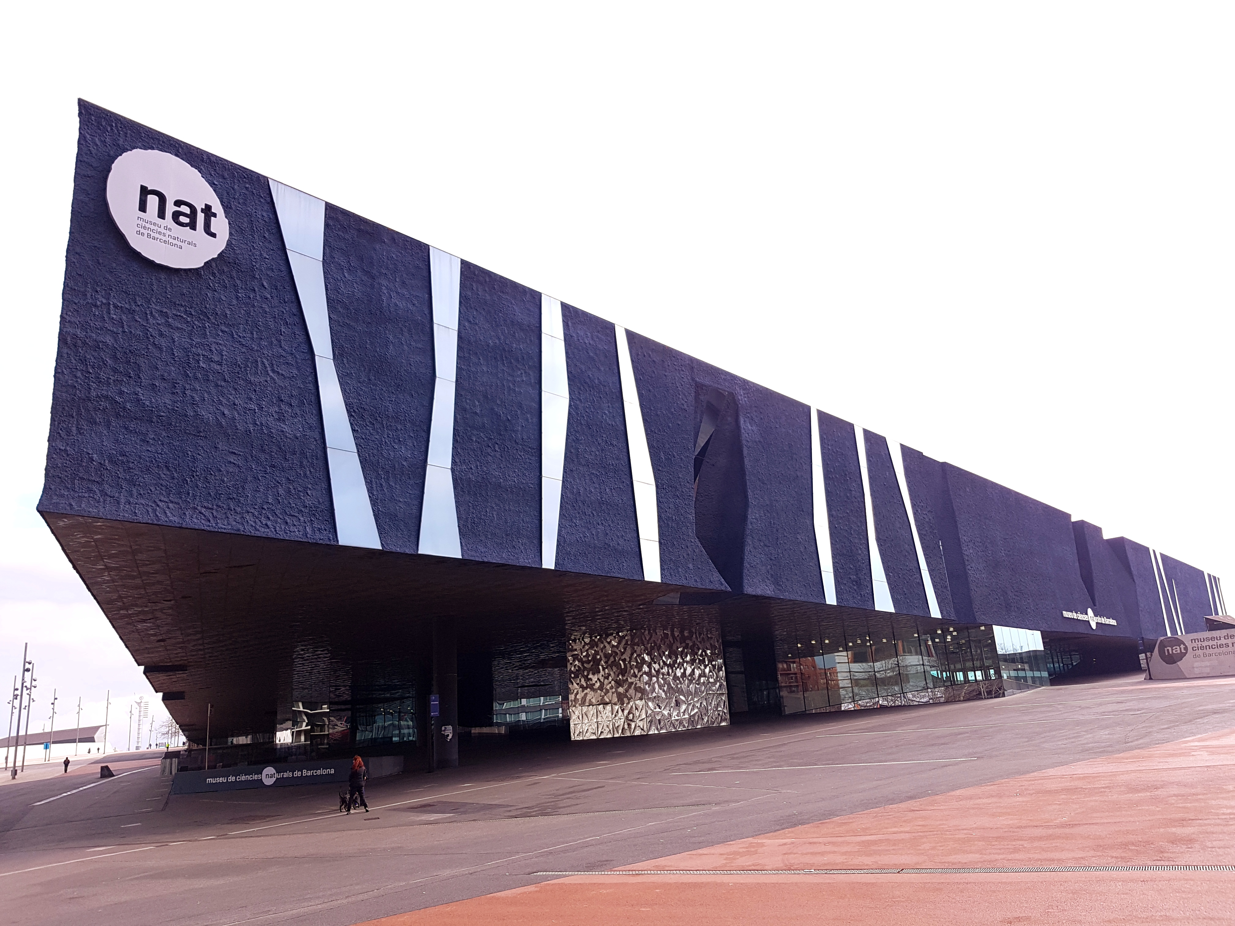 Museu de Ciències Naturals de Barcelona, Parc del Fòrum